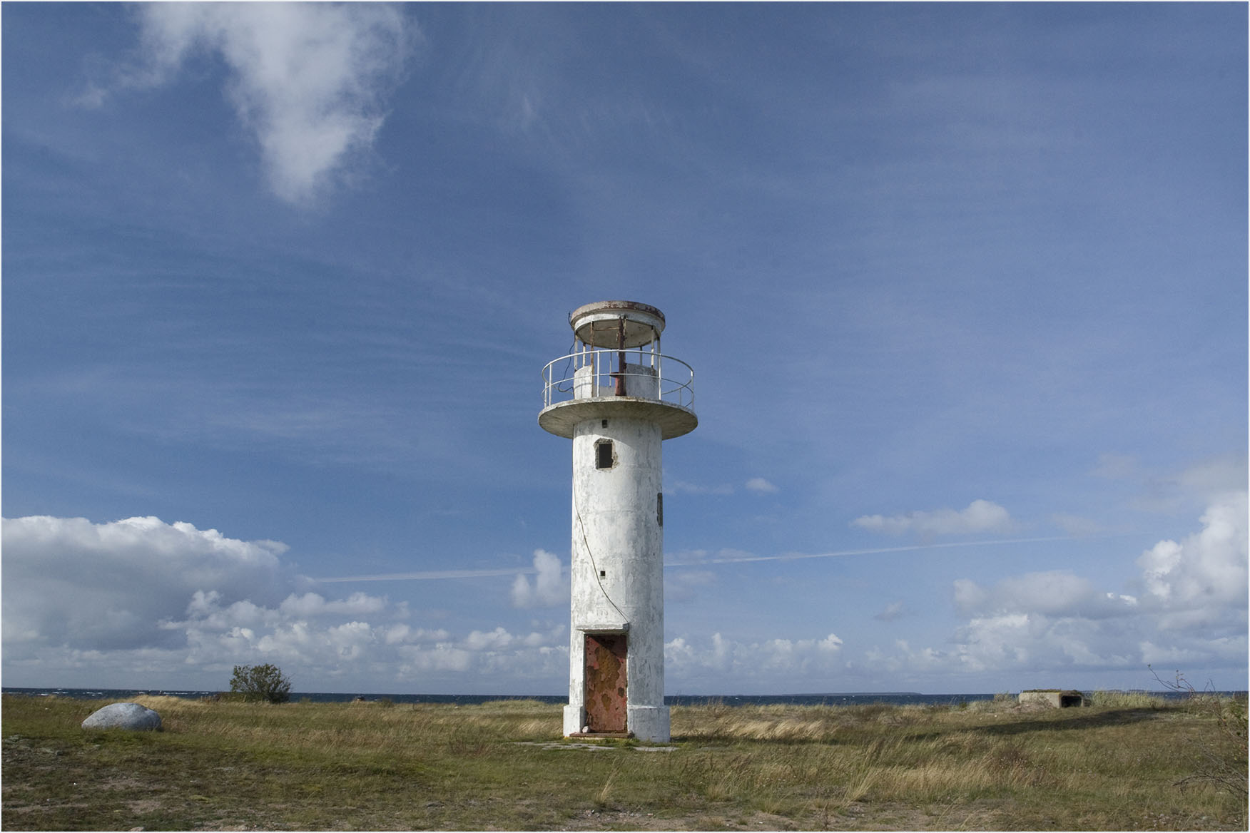 Ihasalu tuletorn